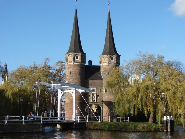 Nedersaksies: Delft_poorte.jpg